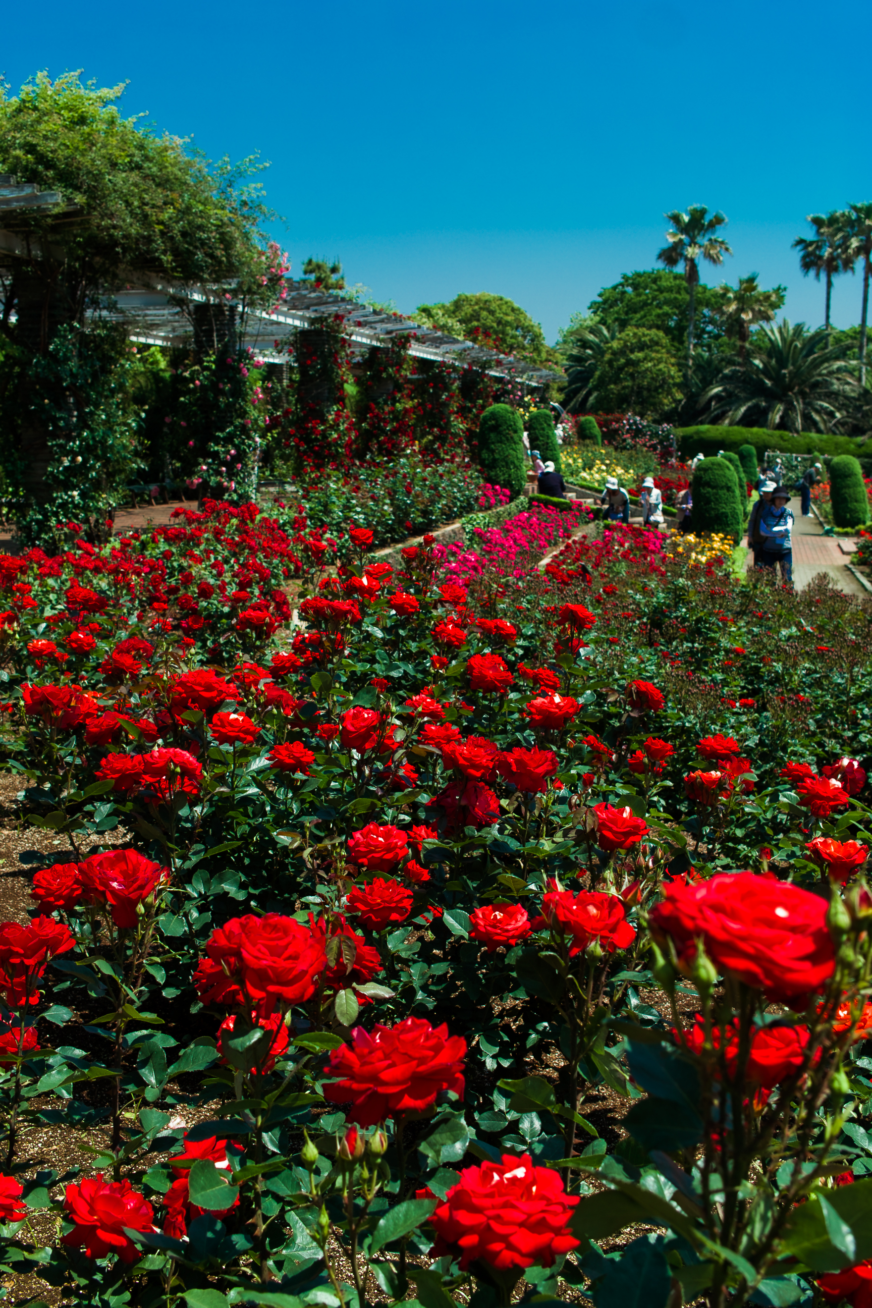 CC-BY-2.0 で Flickrにアップロードされていた画像。 Rose Garden (Yatsu, Chiba, Japan)